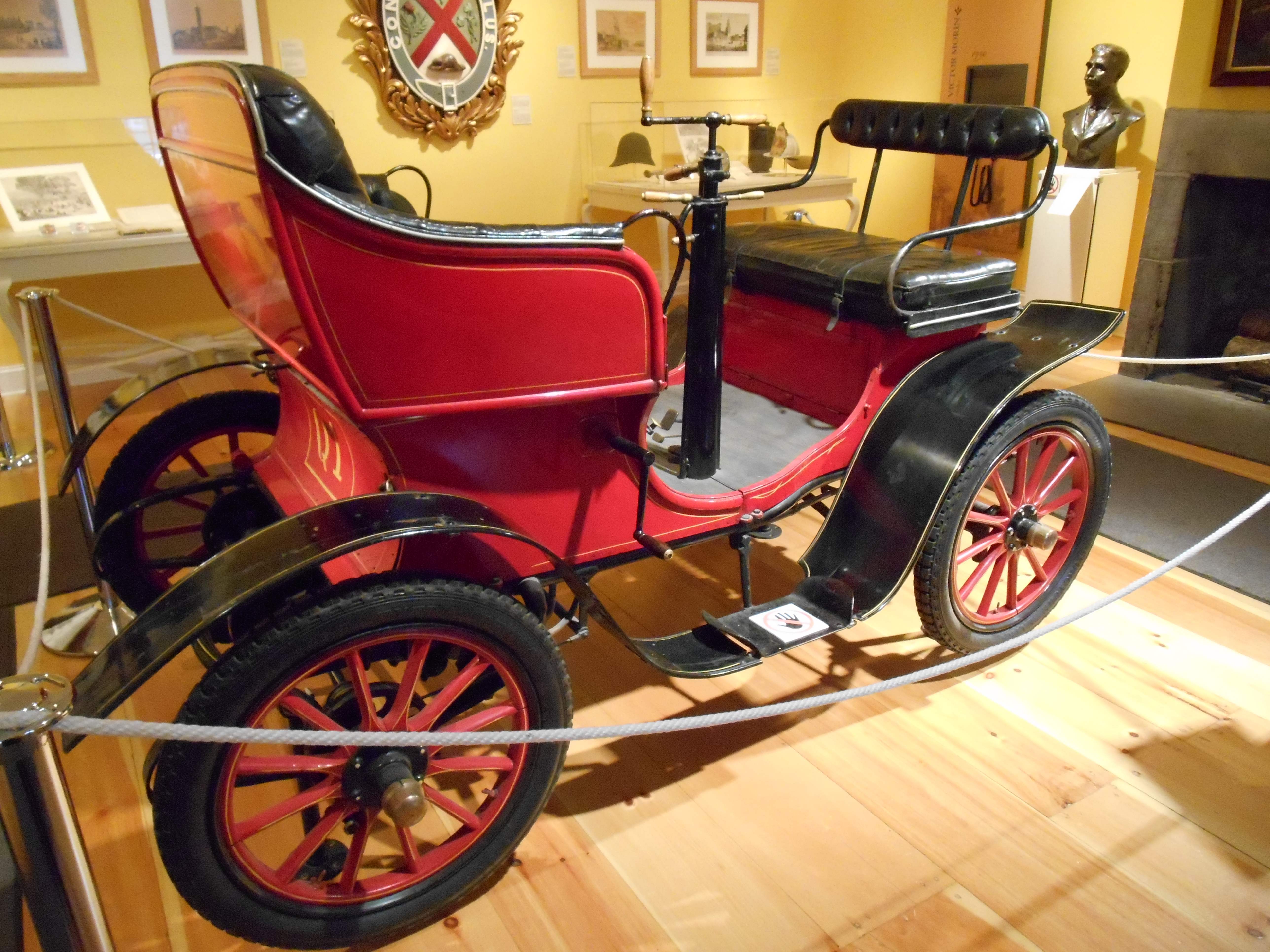 De Dion-Bouton 3,5 CV Vis-à-vis type D (ca. 1899-1901), achetée en 1903 par Ucal-Henri Dandurand, exposée au Château Rameray